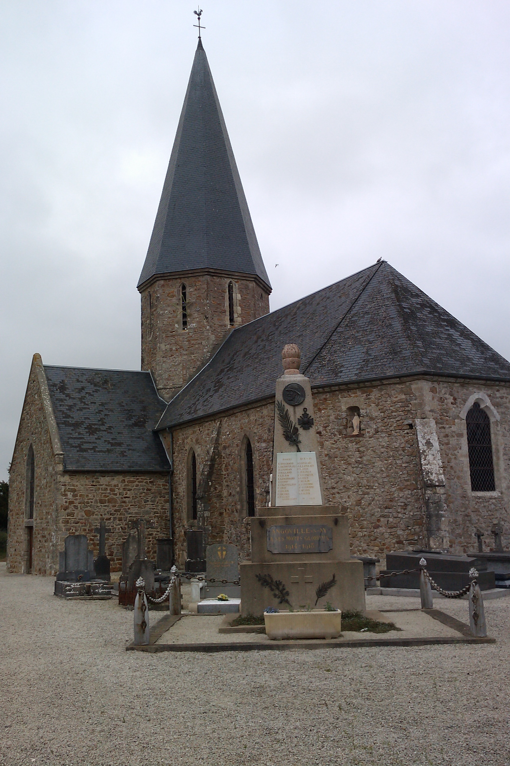 Église d'Angoville-sur-Ay